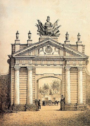 Grabado iluminado representando la Portada de Maravillas diseñada por el constructor Manuel de Escobar, quien participara en la construcción de las murallas de Lima (1663-1687),y que daba acceso a la Ciudad de Lima, fortificada en el siglo XVII.